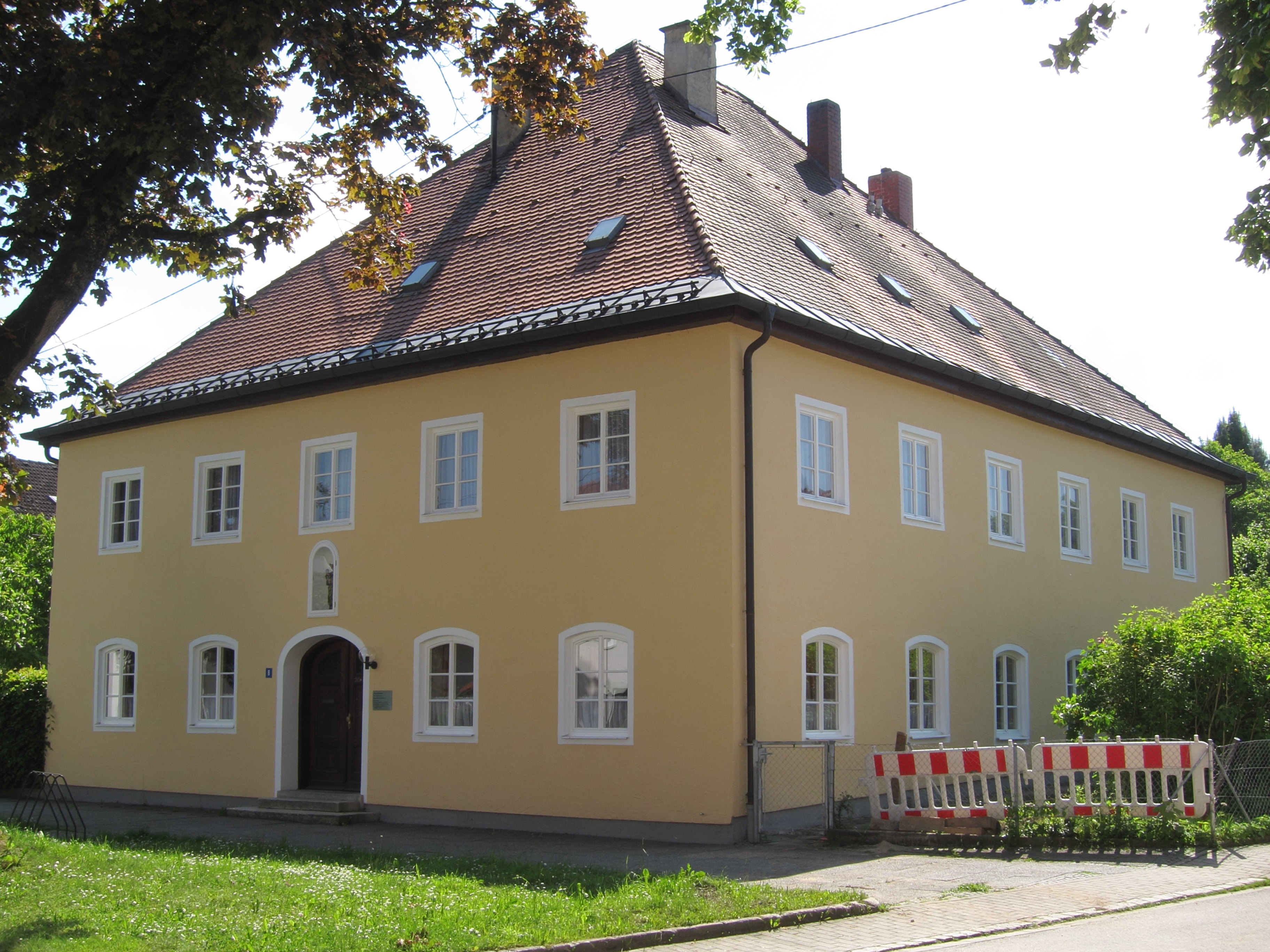 Bischof-Josef-Str. 8; Pfarrhaus, zweigeschossiger kubischer Walmdachbau, Mitte 18. Jahrhundert.